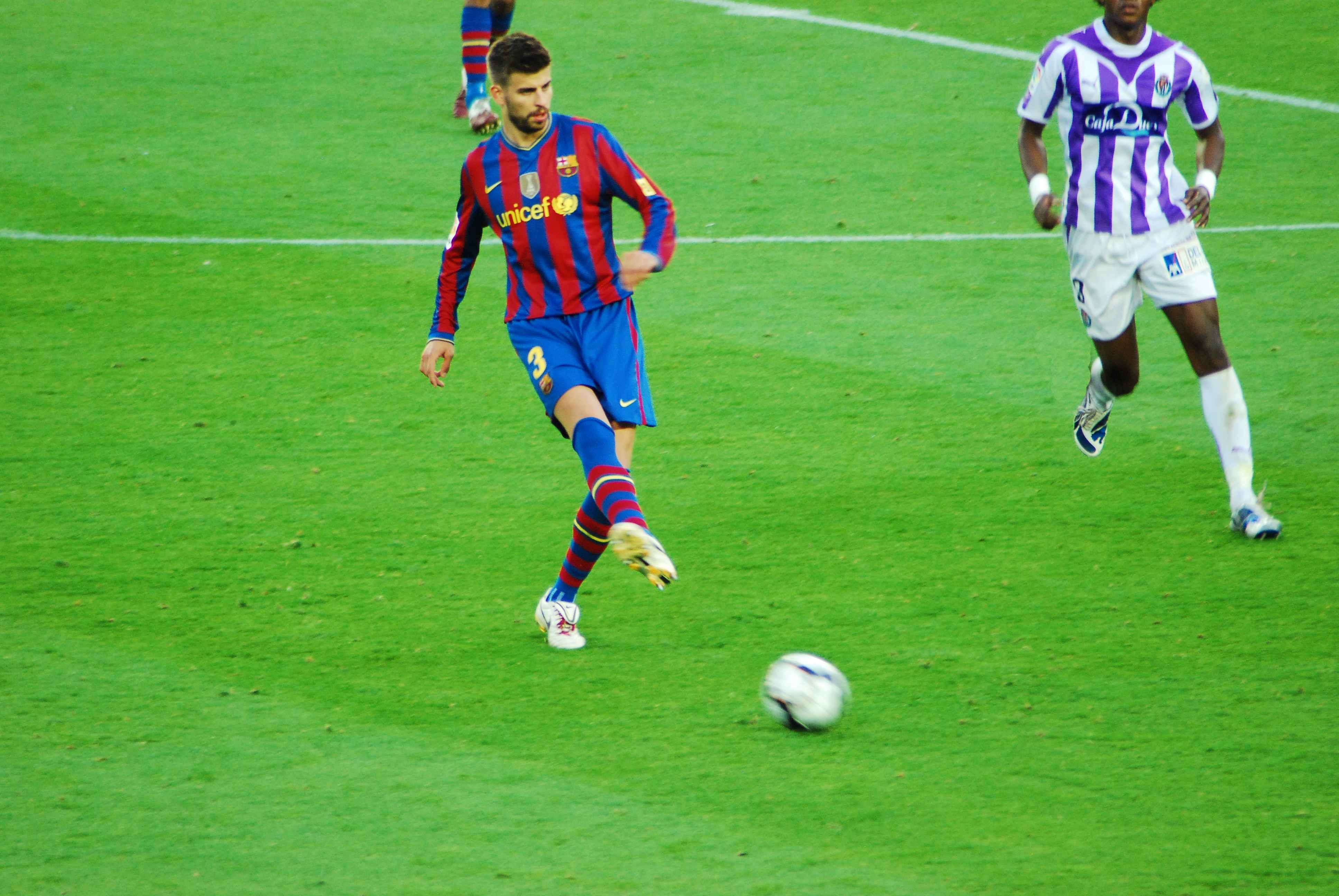 Gerard Piqué realizando un pase.